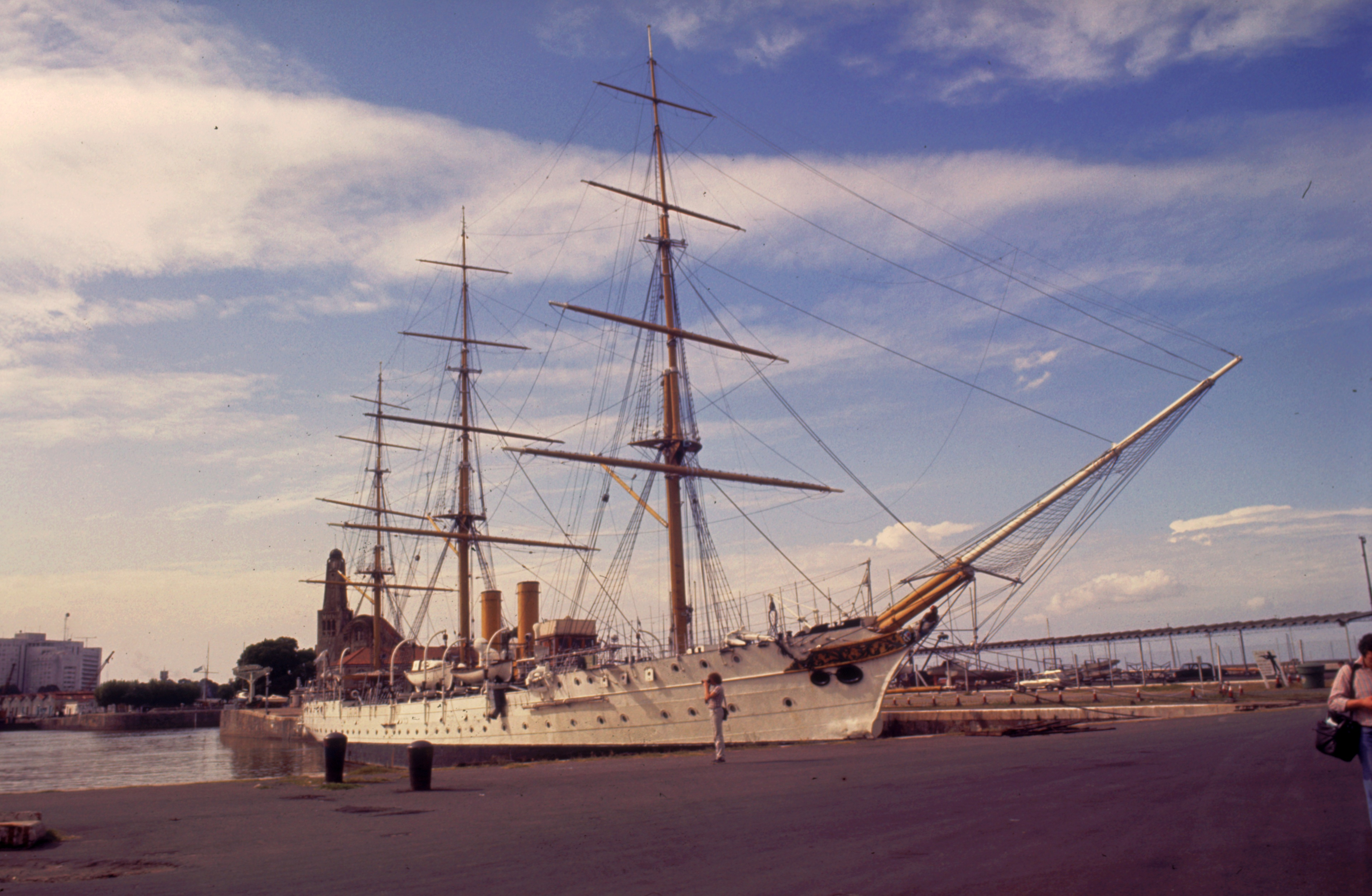 Buque Museo Fragata Presidente Sarmiento, Armada de la República Argentina